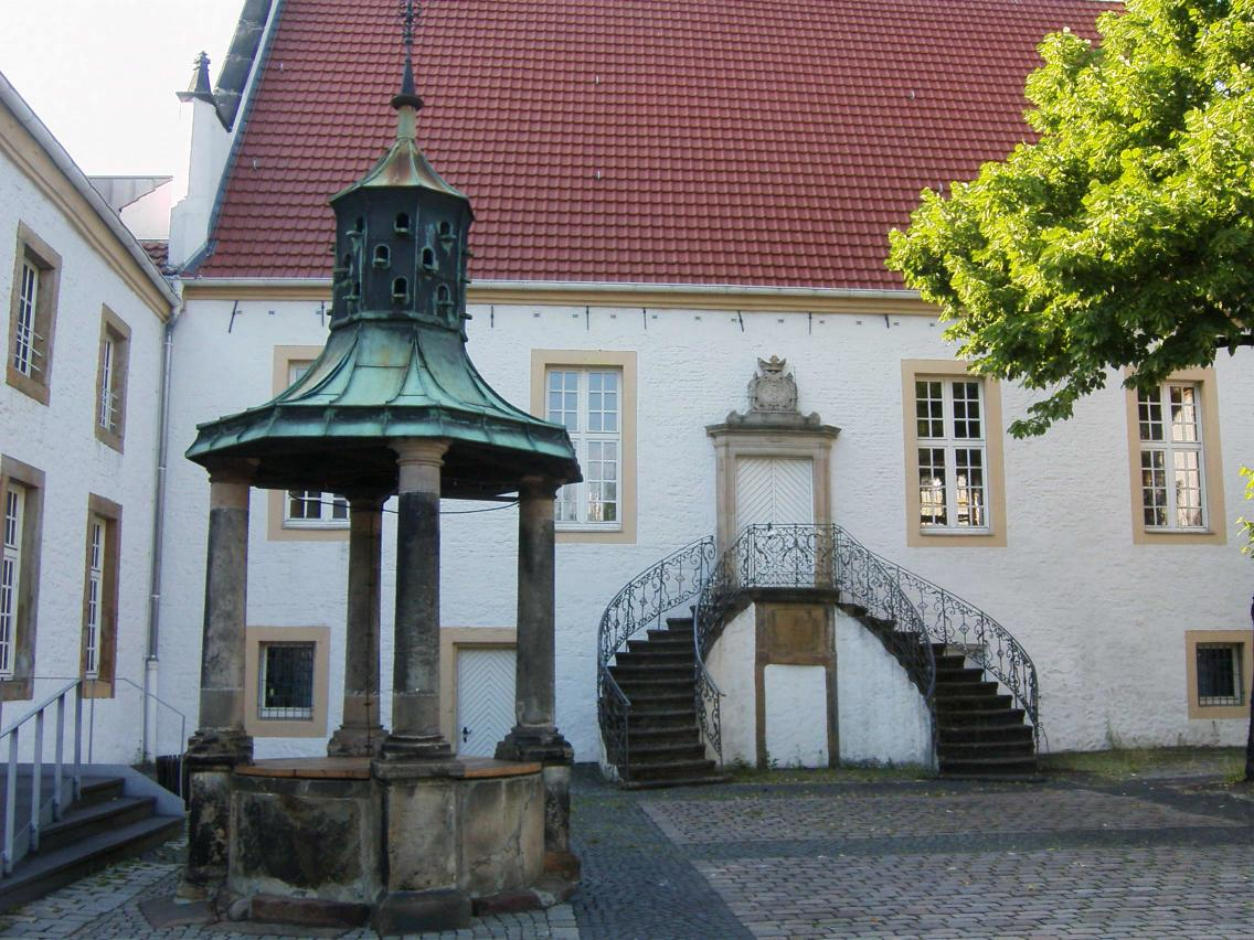 Falkenhof in Rheine, Taubenbrunnen mit Dachspitze und als Hofeisentreppe ausgestaltete Freitreppe (Bild in höherer Auflösung auf Anfrage)